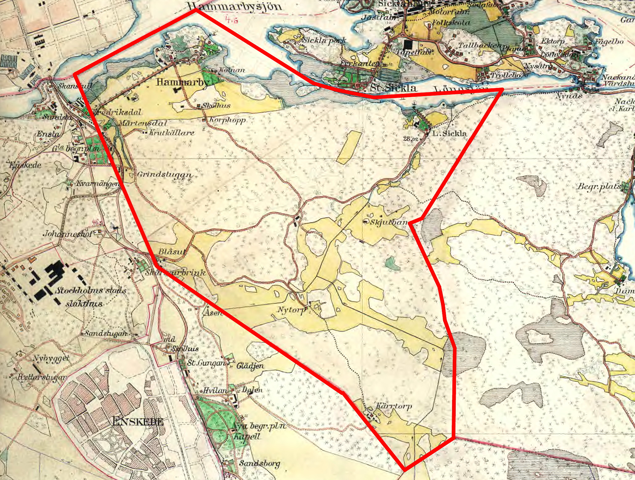 Egendomen Hammarby gård ägor, Stockholm på Häradsekonomiska kartan